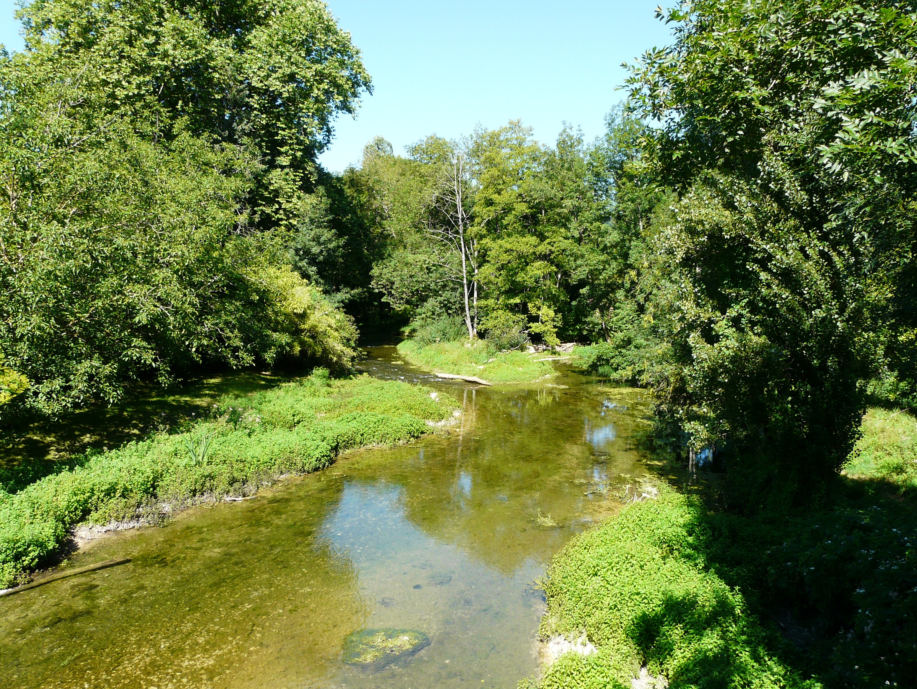 Le Céou en aval du pont de la route départementale 50, Saint-Cybranet, Dordogne, France.